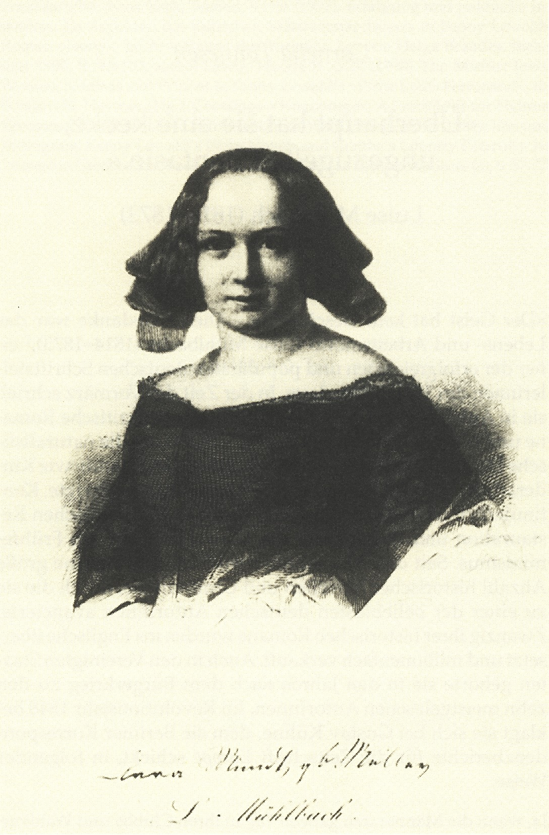 Abbildung der Schriftstellerin Luise Mühlbach (1814-1873)